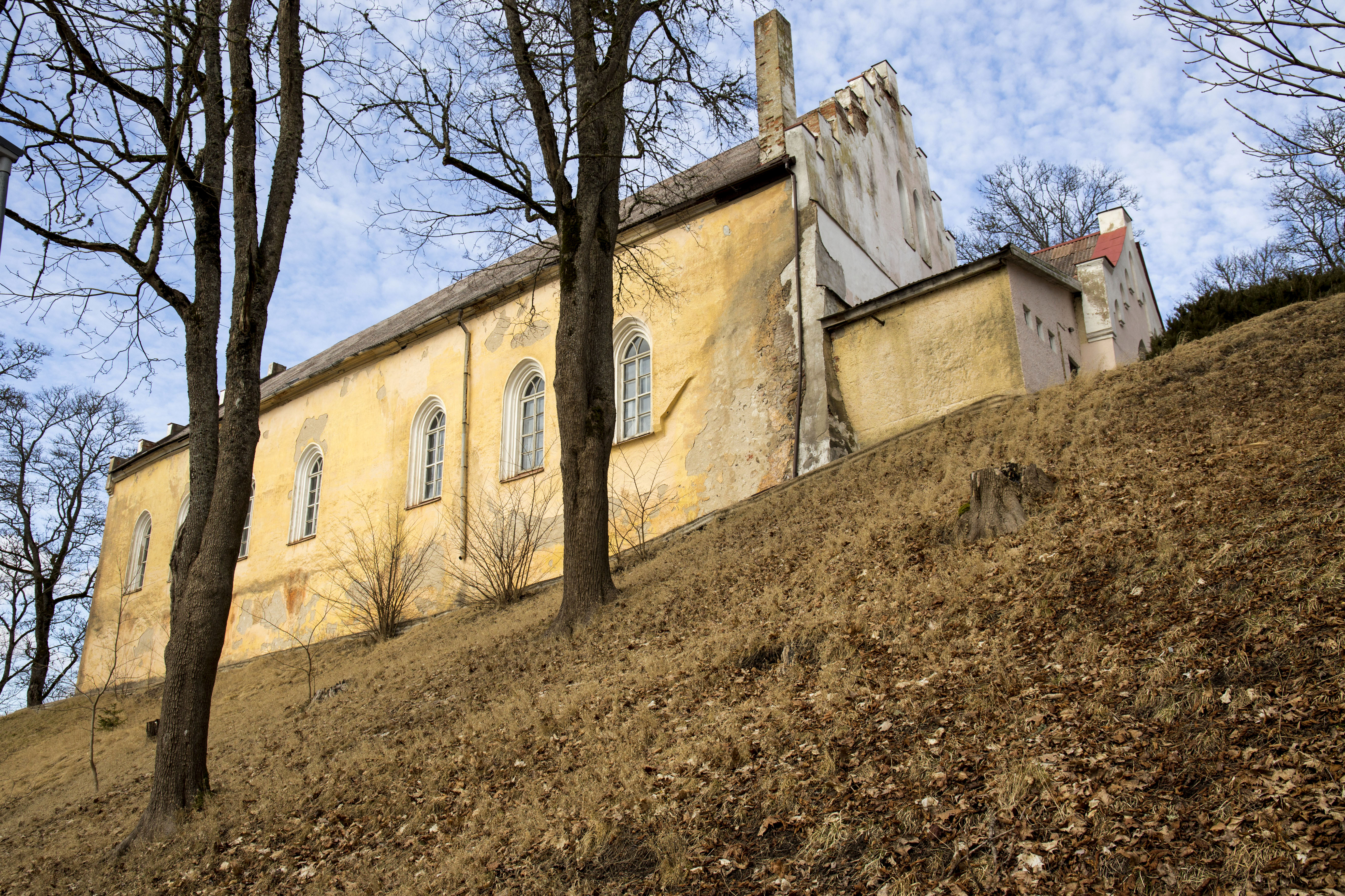 Aizputes Sv.Jāņa luterāņu baznīca, Aizpute, Liepājas iela 3